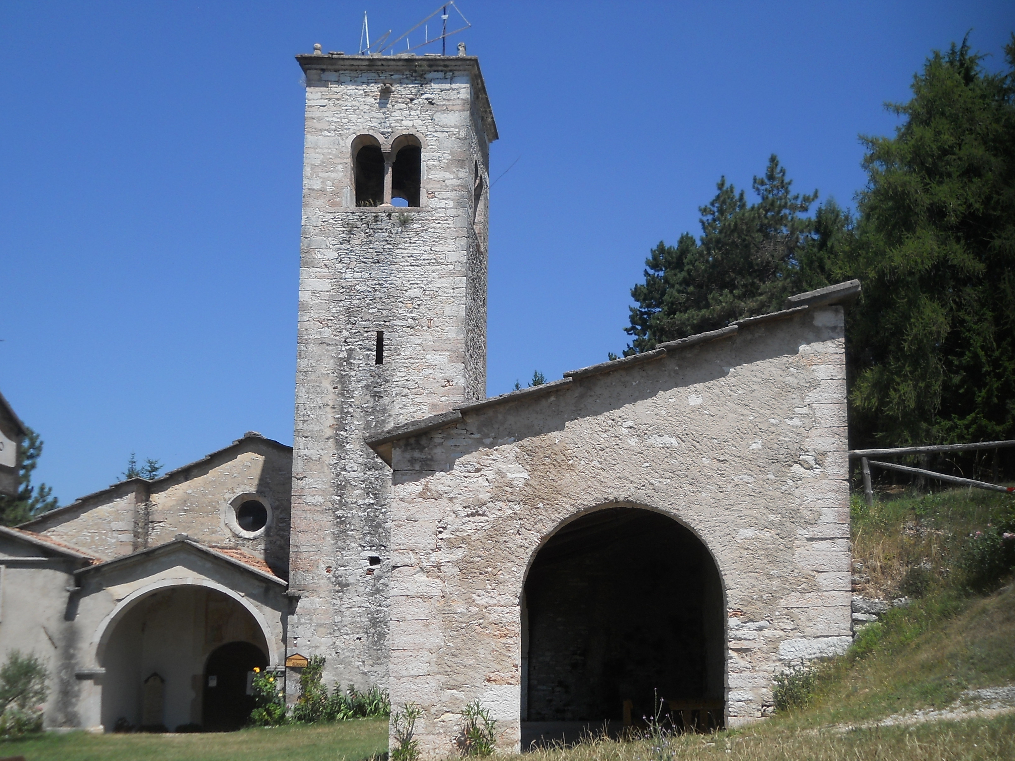 Chiesa romanica di San Leonardo sul monte Moro (XIV secolo) presso San Mauro di Saline, provincia di Verona.